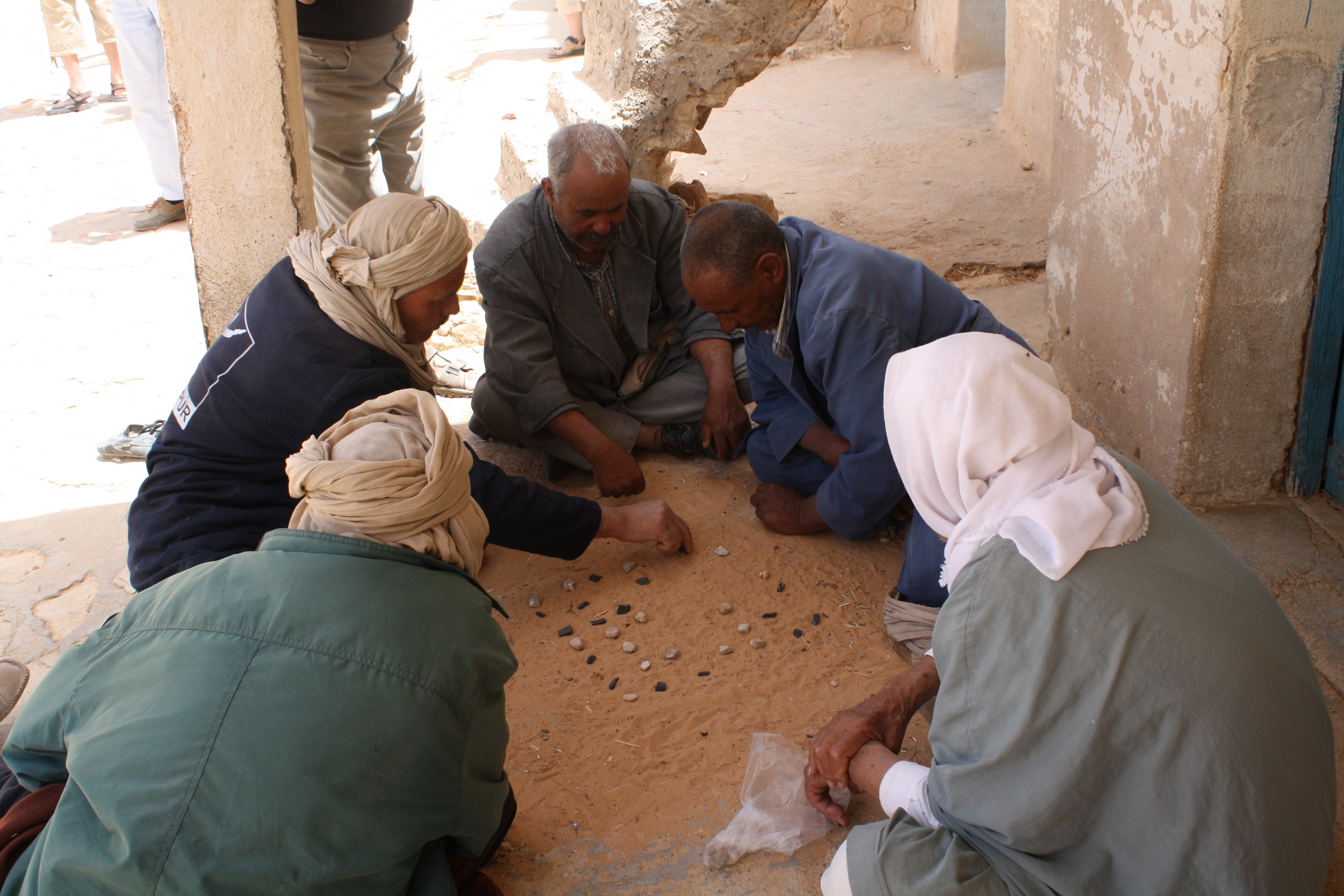 Jeu de kharbaga (jeu de stratégie, damier 7x7, 48 pions) - sud de la Tunisie à Médenine